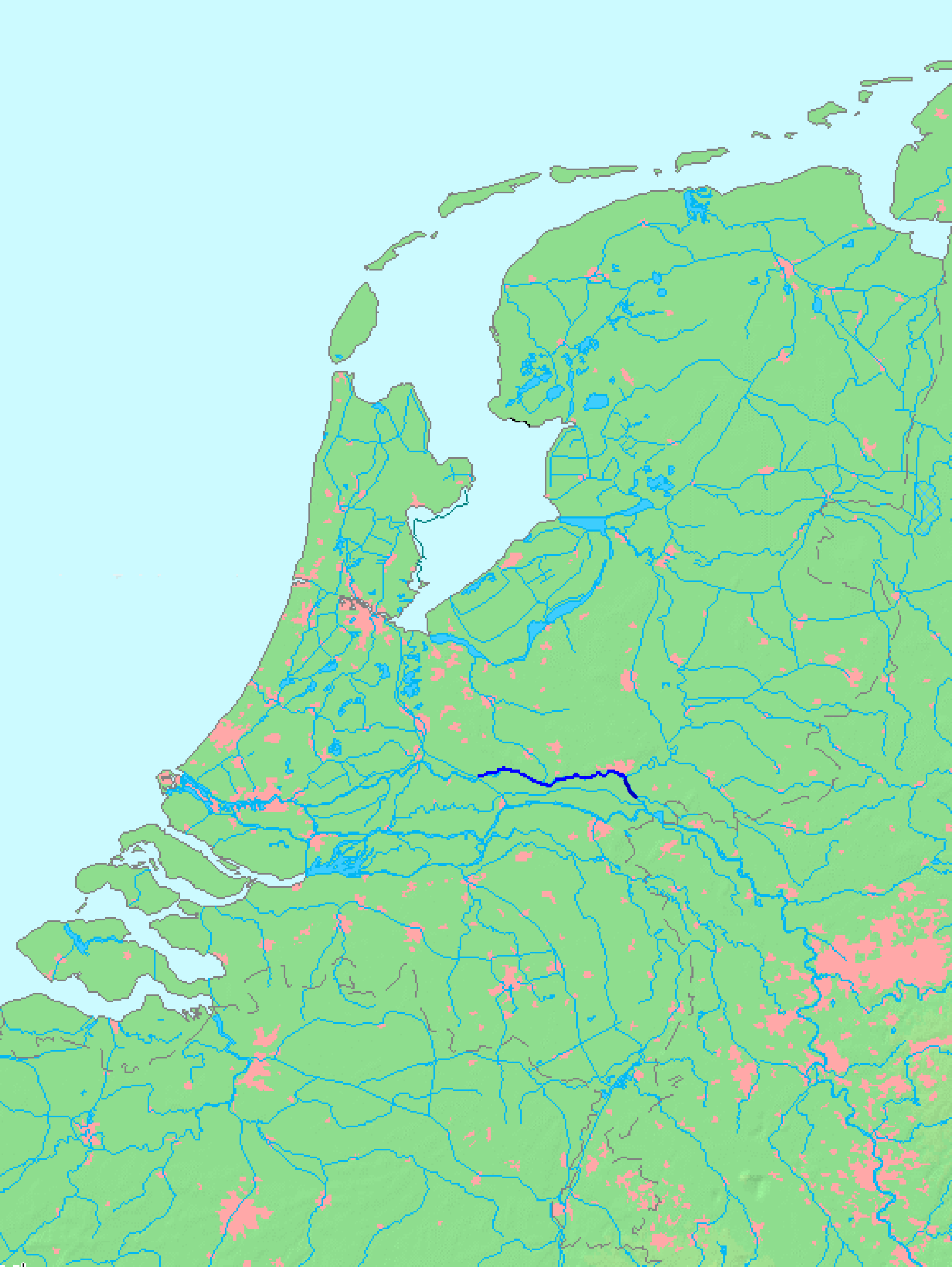 Ligging Nederrijn in Nederland